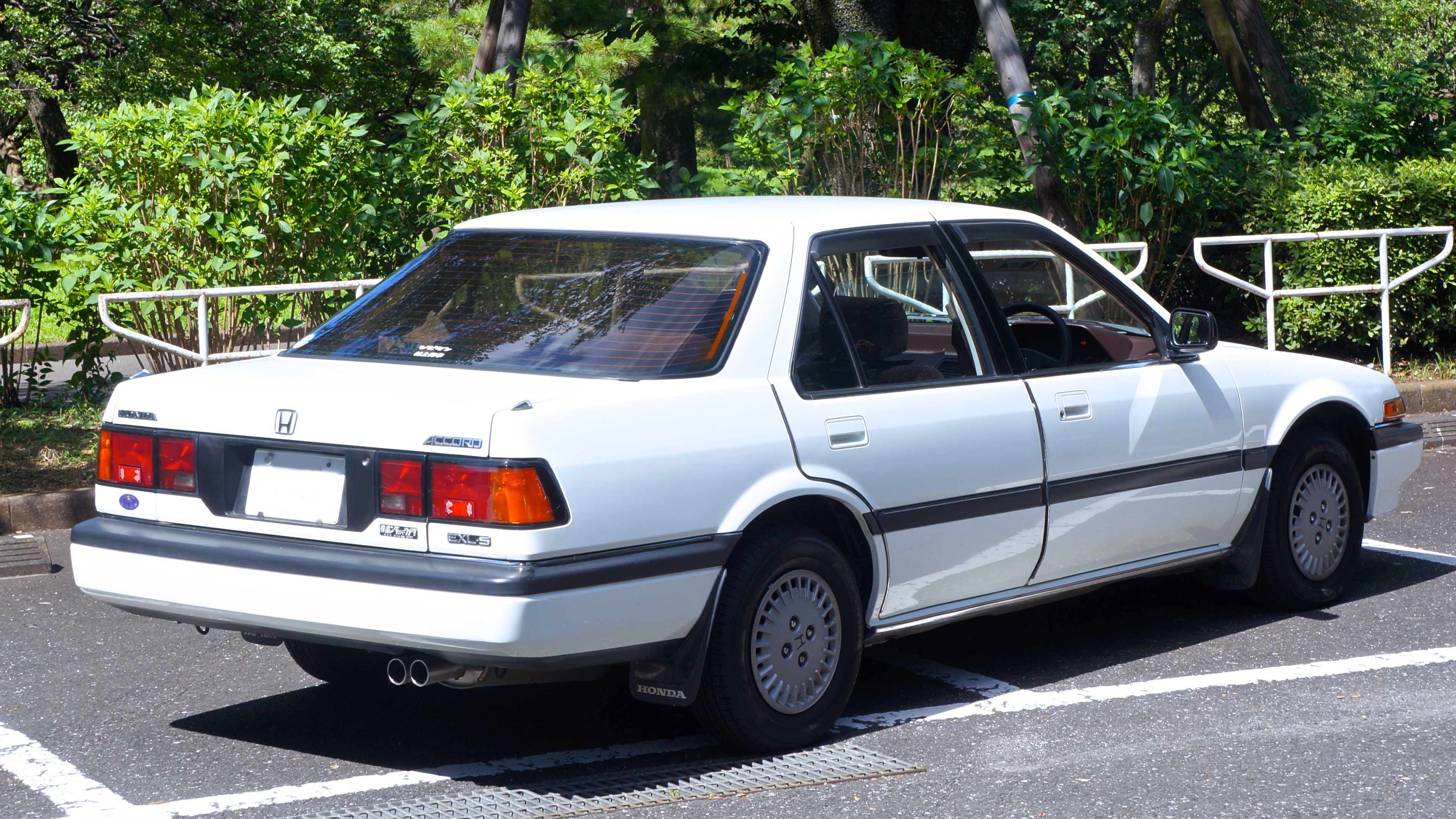 ホンダ アコード 1985年 リア